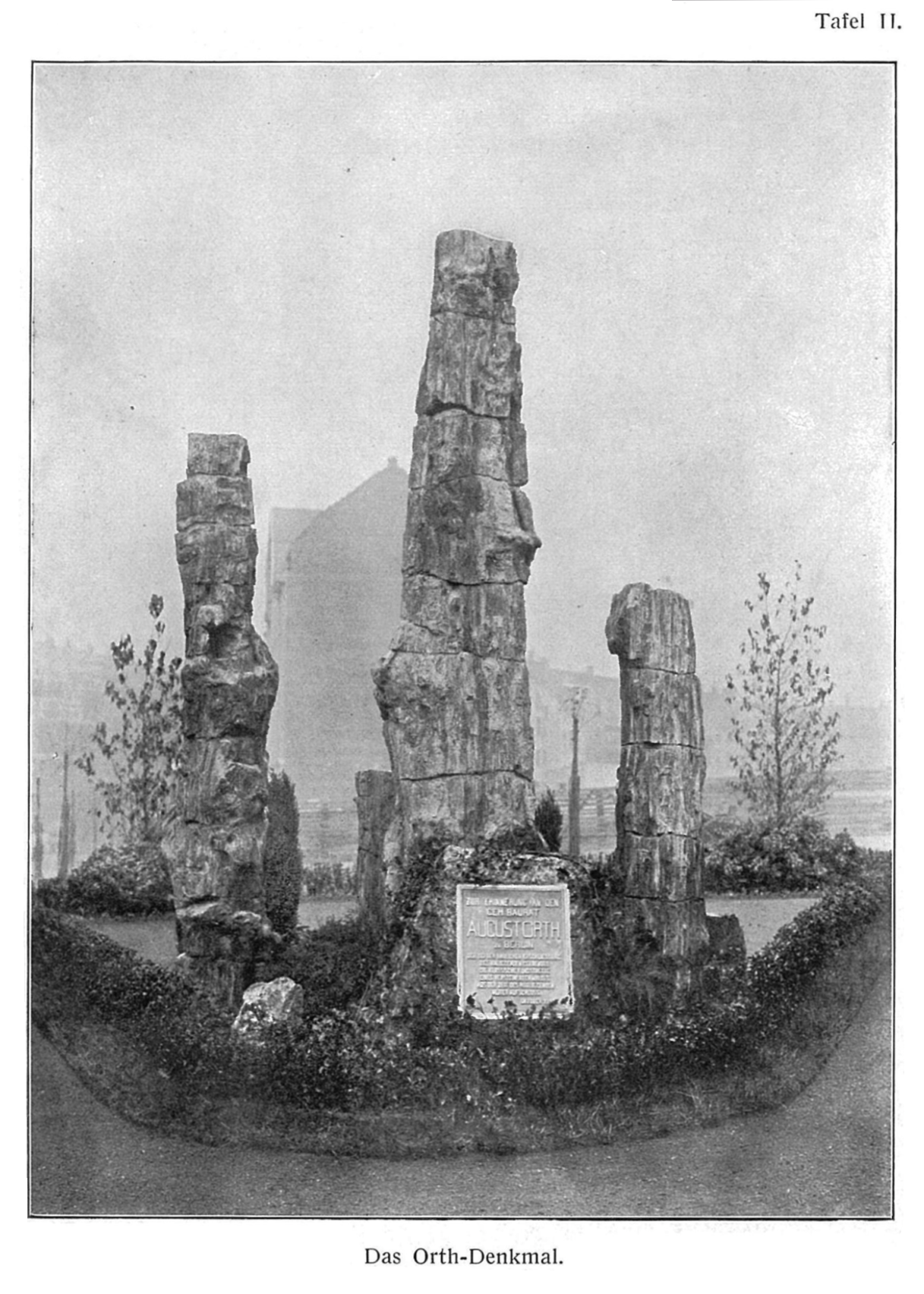 Foto des Orth-Denkmales 1927